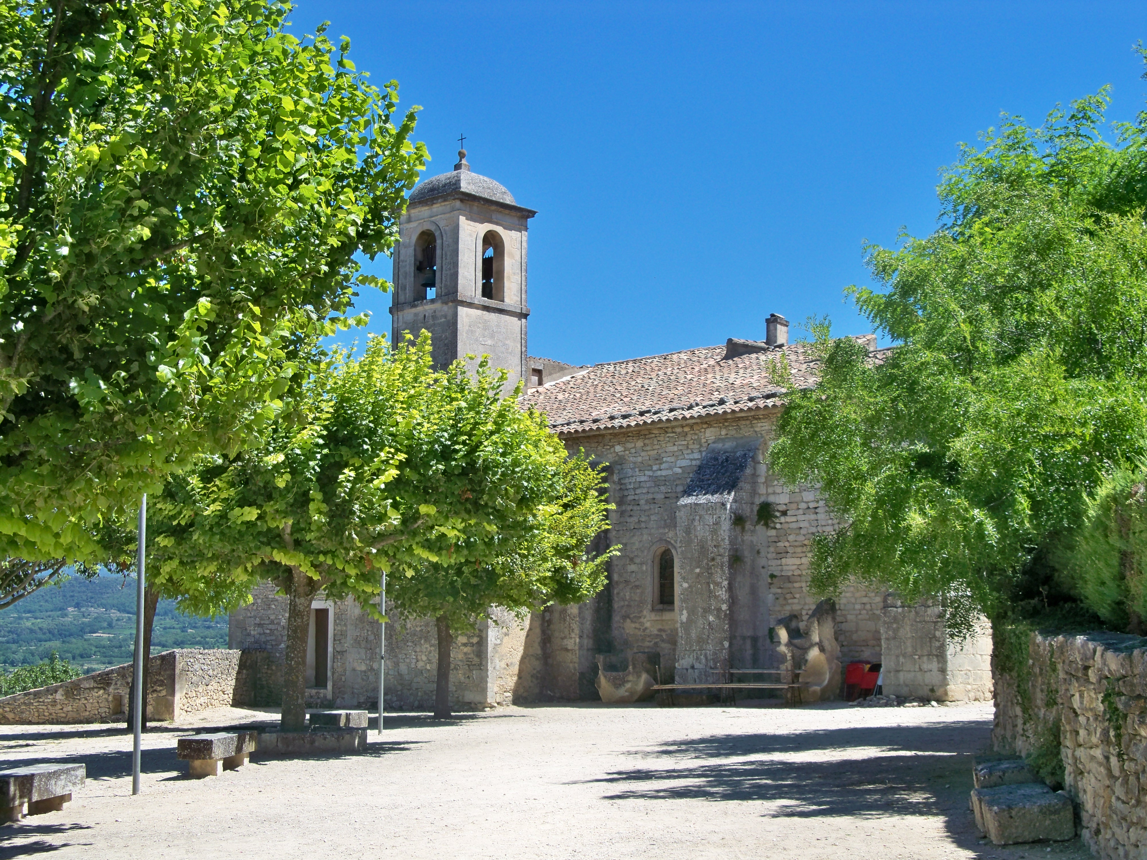 église de Lacoste, Vaucluse, France